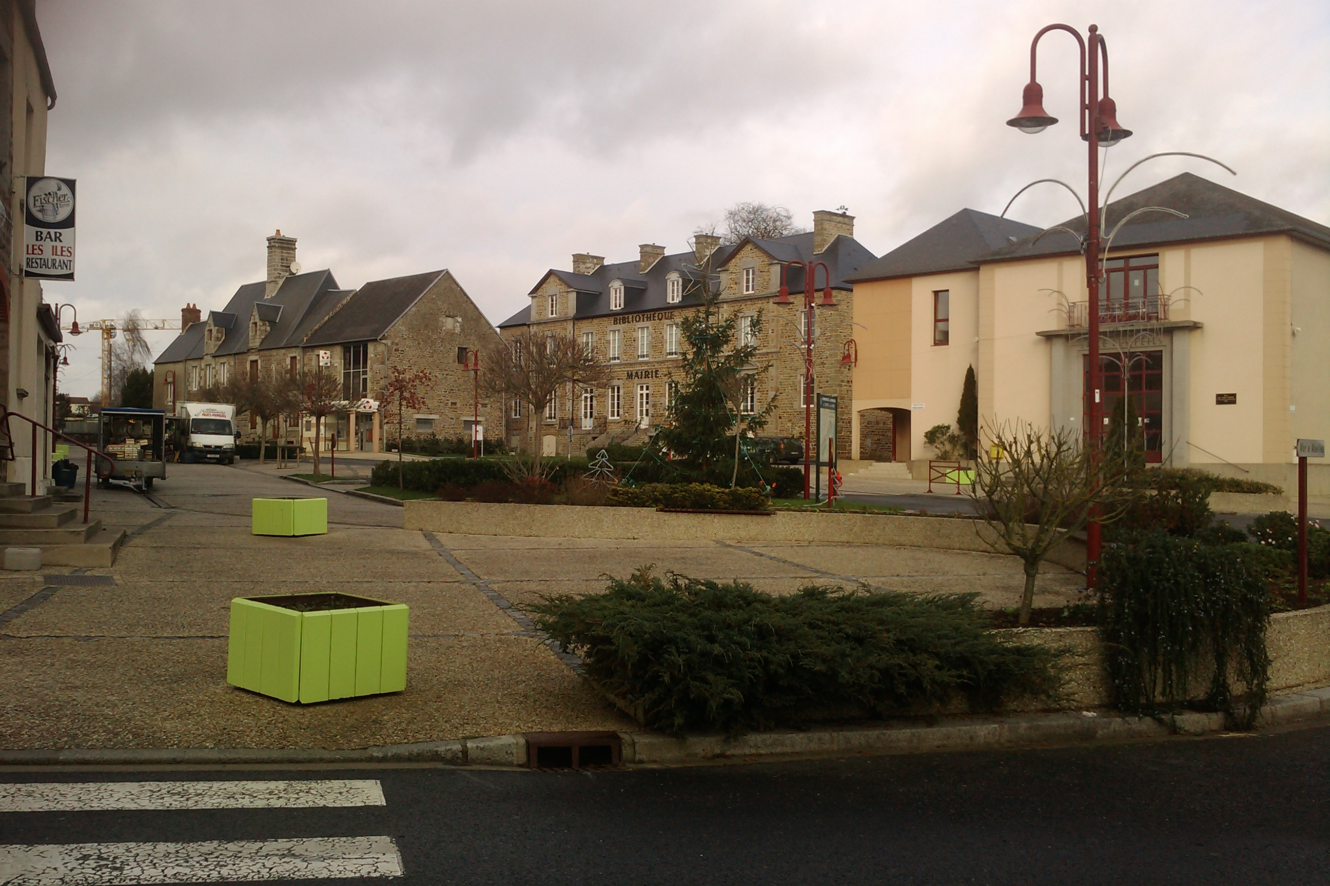 Tessy-sur-Vire